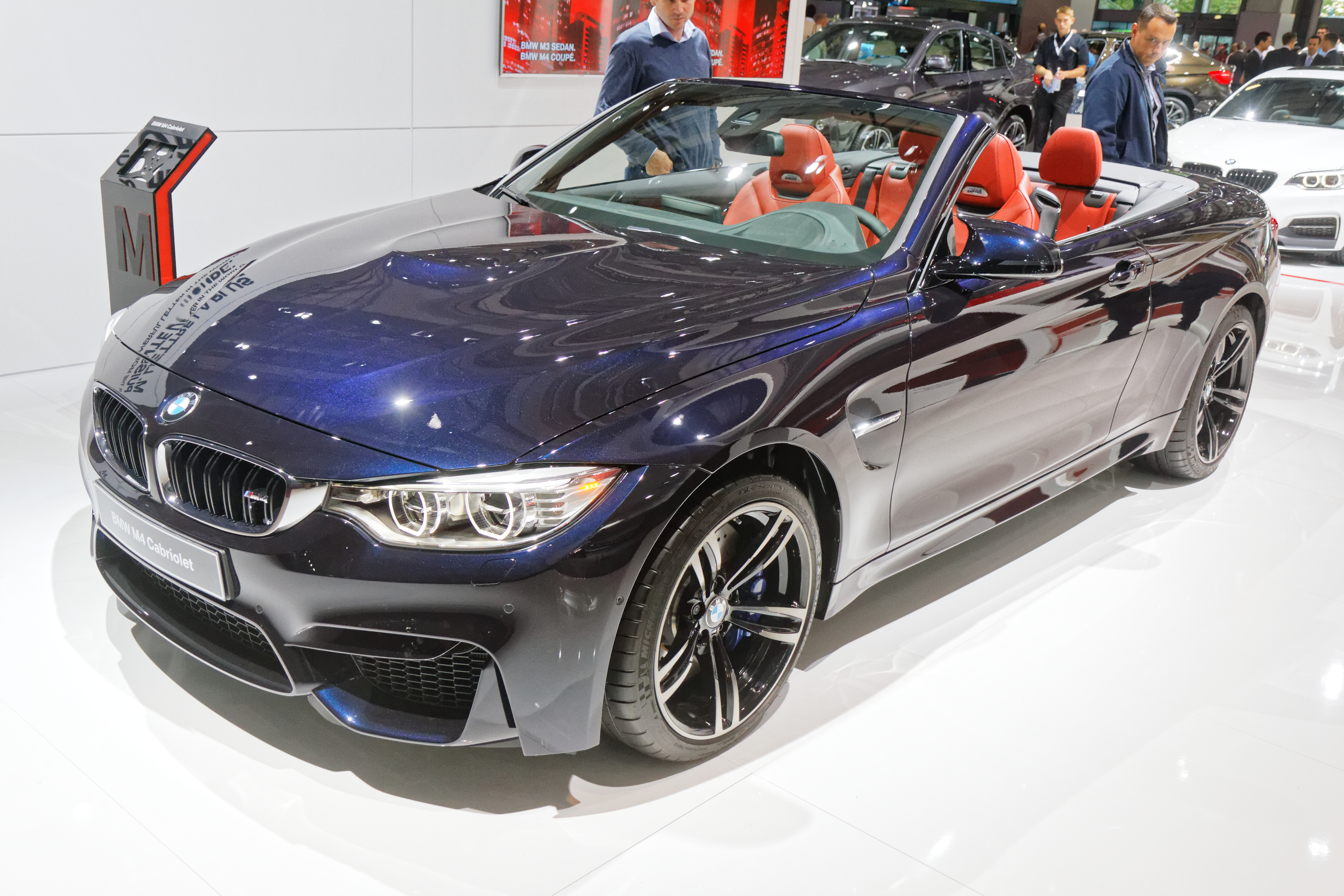 Une BMW M4 Cabriolet présentée lors du mondial de l'automobile de Paris 2014.